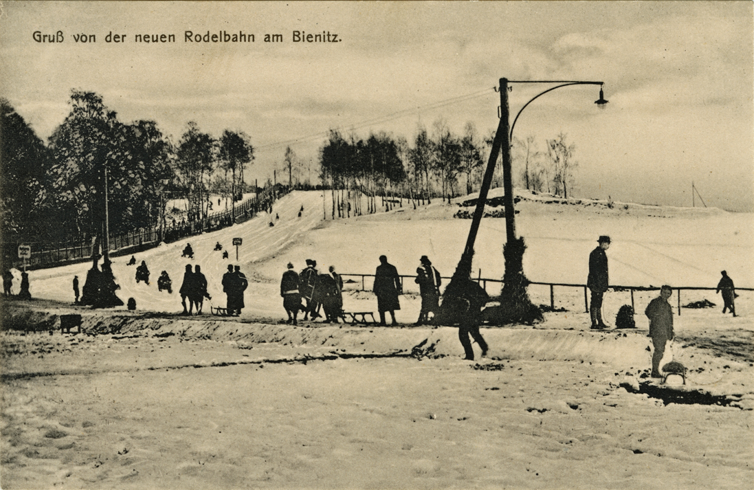 "Gruß von der neuen Rodelbahn am Bienitz" (Postkarte, um 1912, Verlag Georg Jena am Bienitz), Stadtgeschichtliches Museum Leipzig, Inv.-Nr. Bienitz 2)